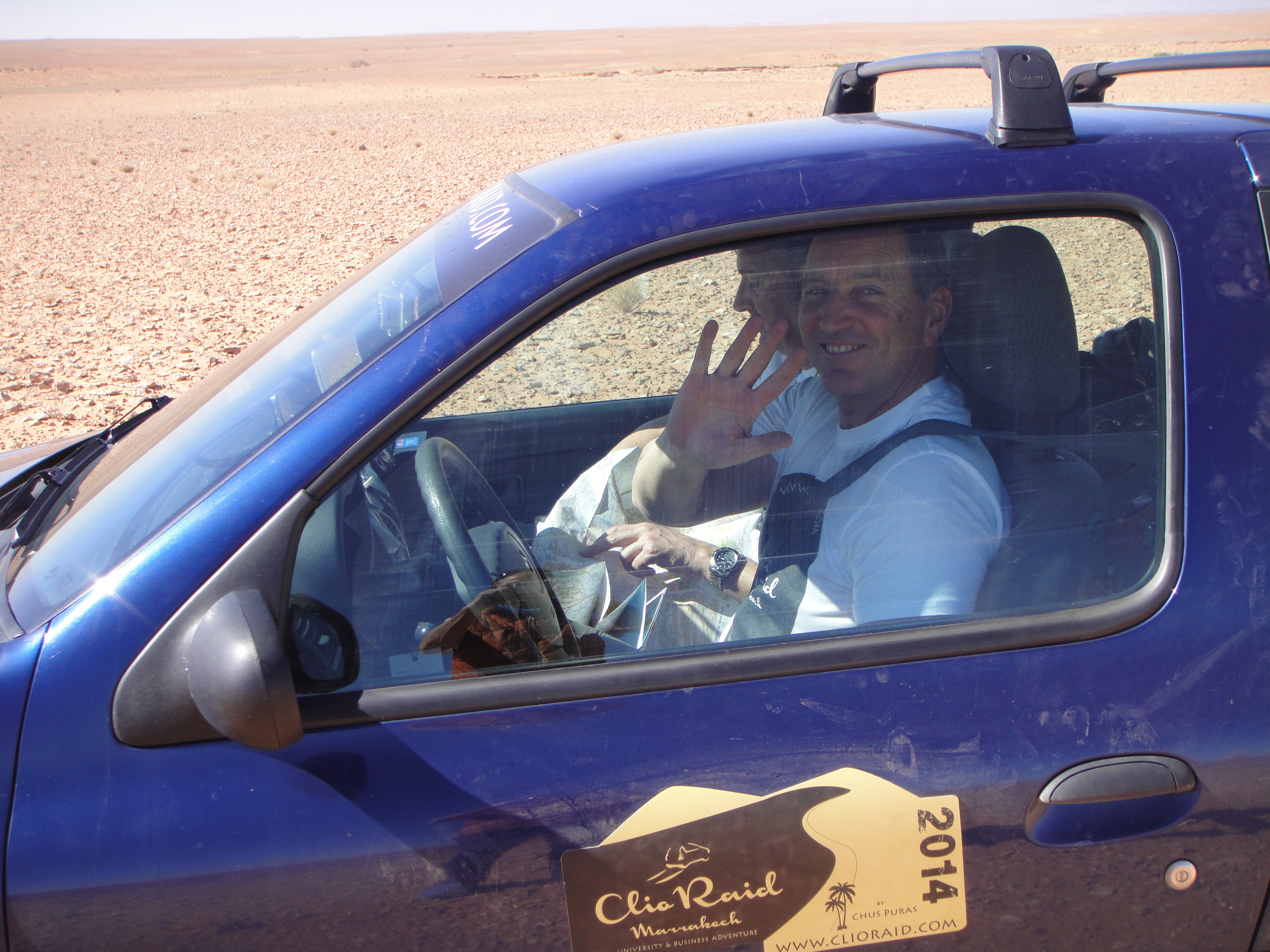 Jesús Puras promocionando el Clio Raid Marrakech